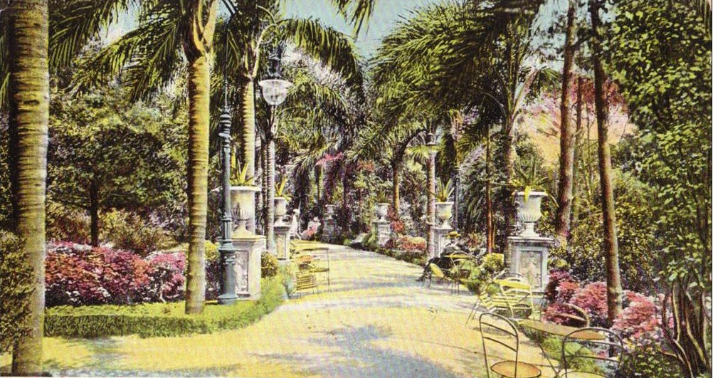 Fotografía coloreada de un sendero en el Parque Lezama de Buenos Aires, con bancos metálicos y un hombre vestido según la usanza del 1900.